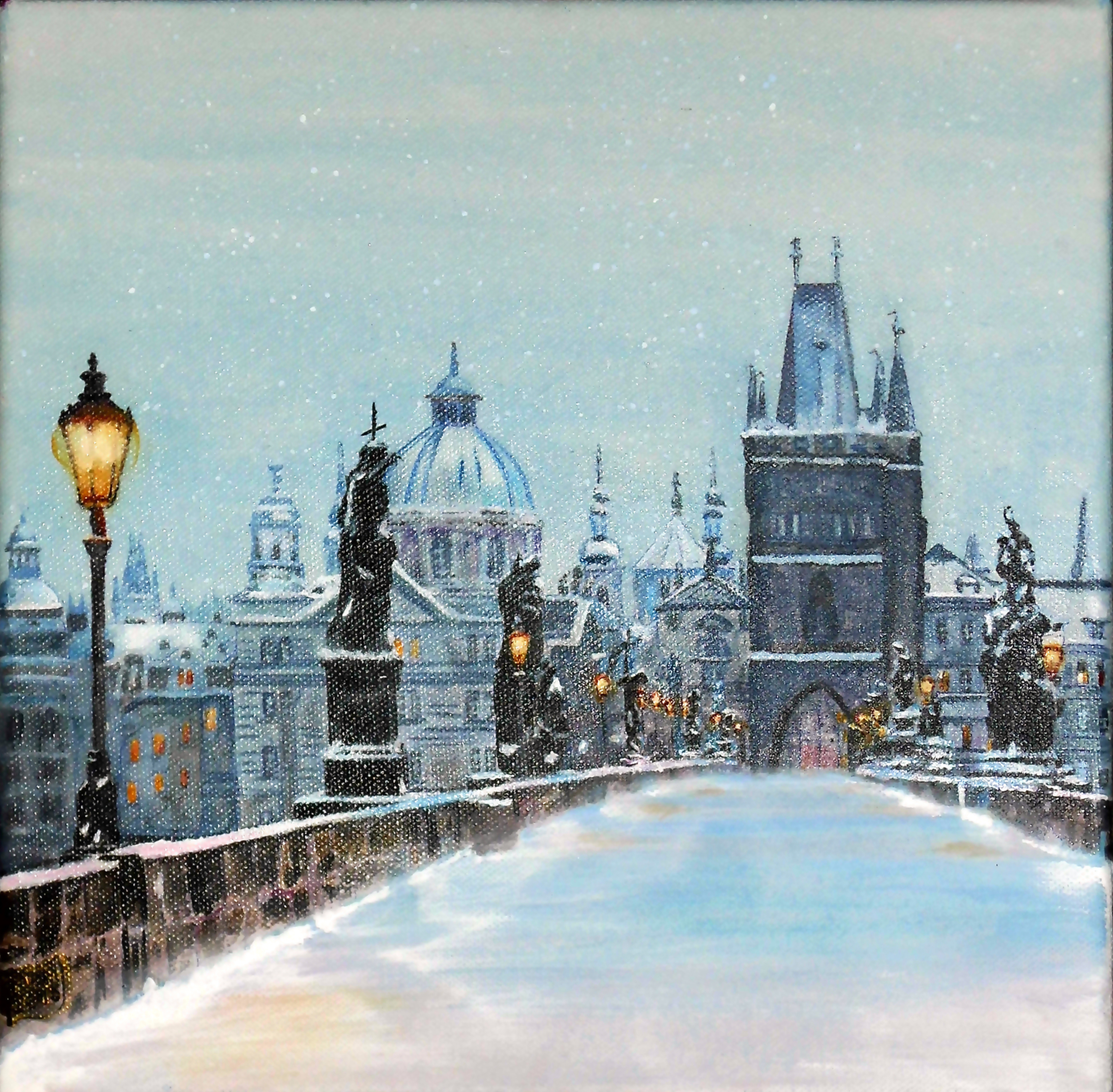 Karlův Most, Akryl, 2016, D.Water Mos.